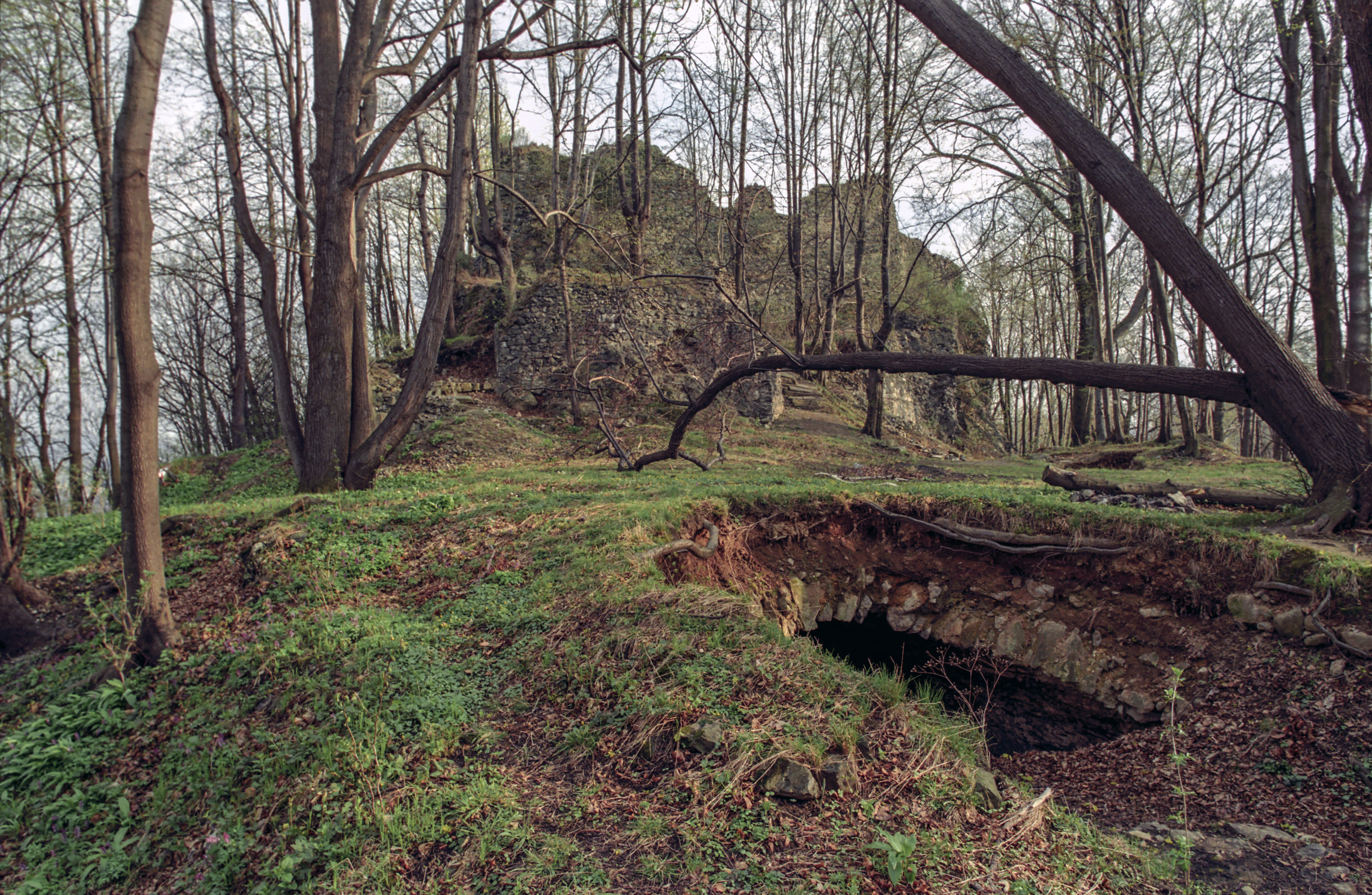 Zamek Wleń